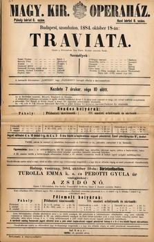 A Traviata bemutatójának plakátja a Magyar Királyi Operaházban(1884)